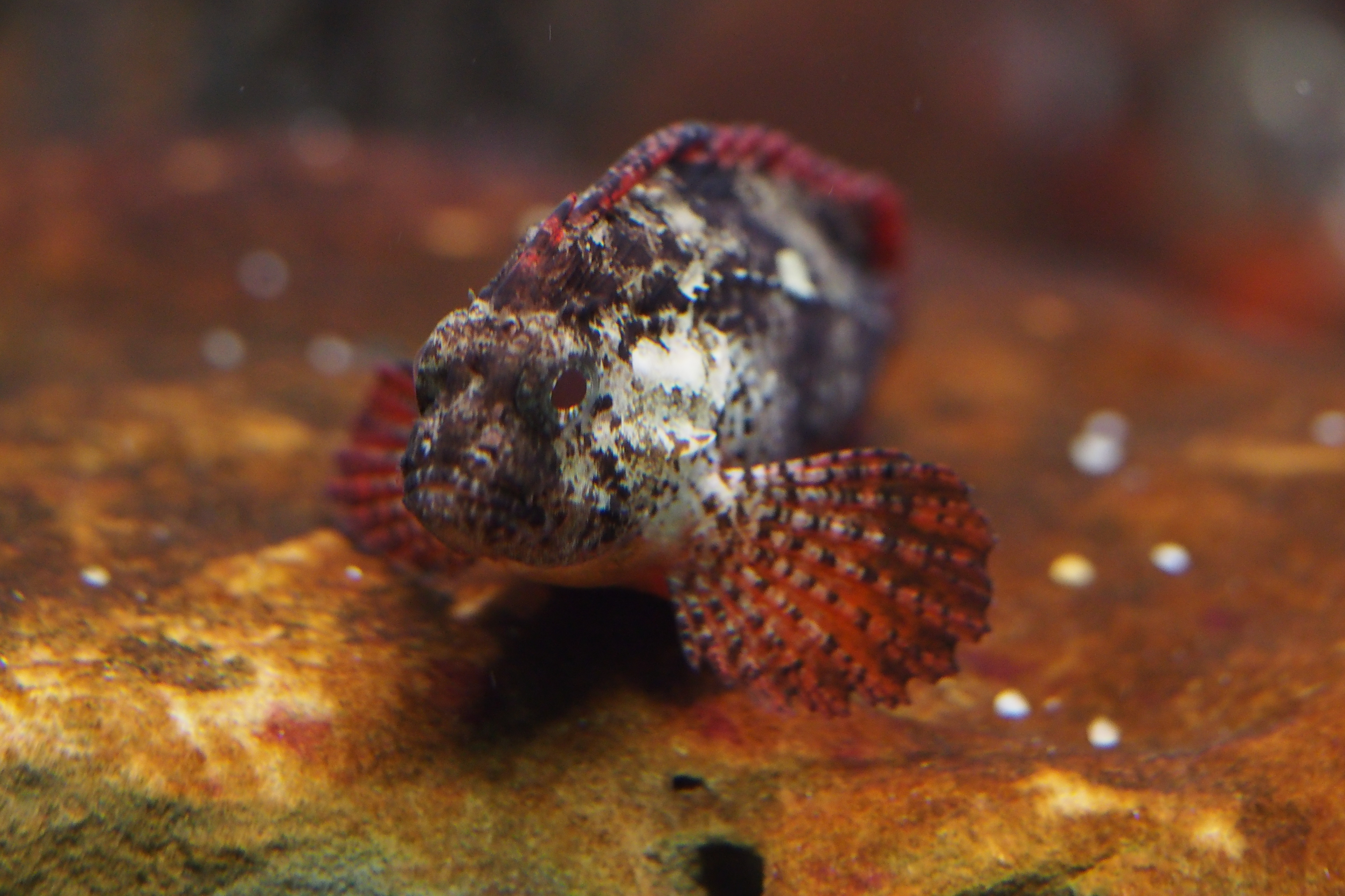 ハオコゼ. at Suma aquarium.